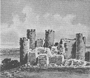 Atalaya del Montecillo según aparecía en 1860 (del Cap. IX).